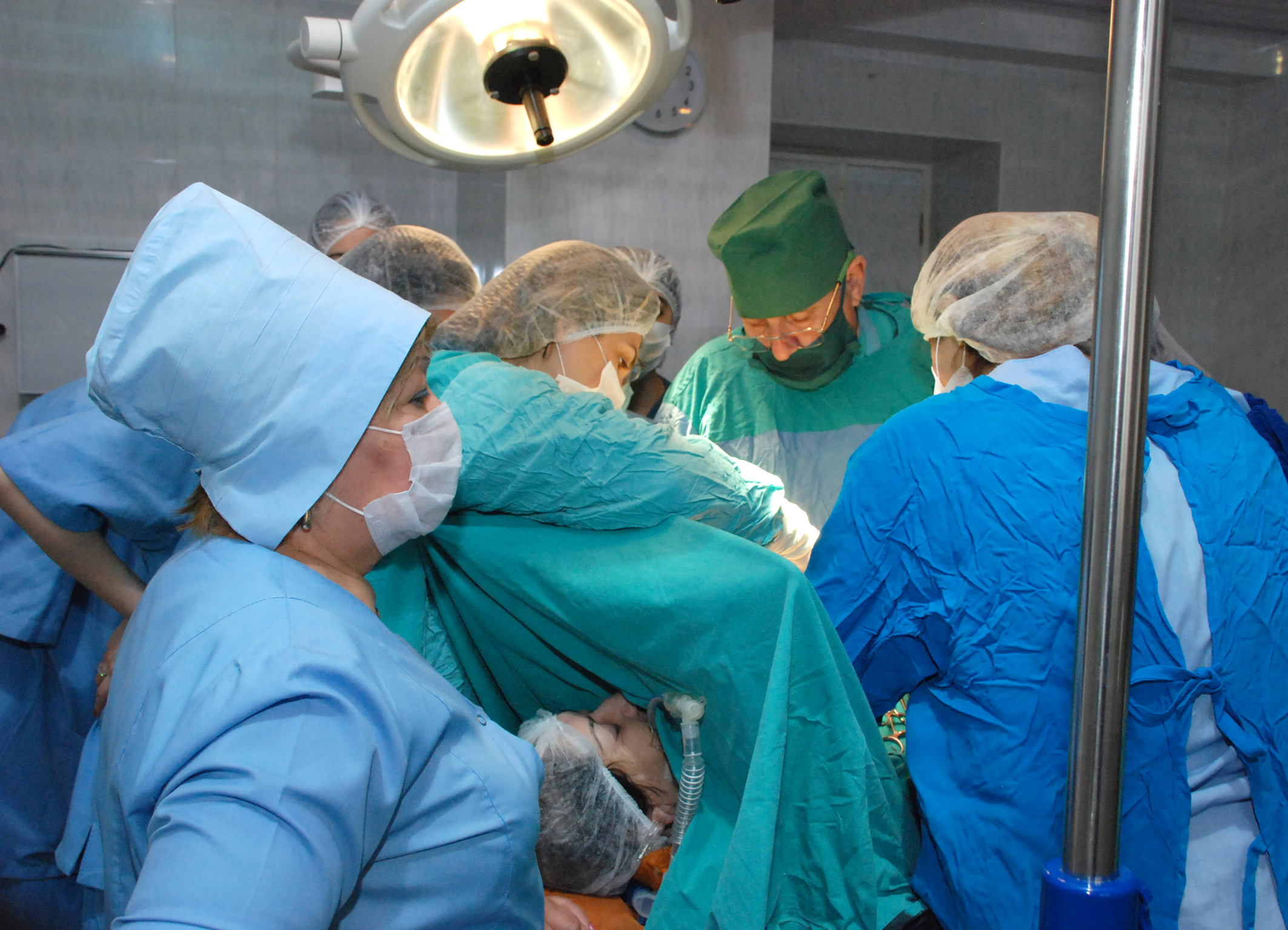 Akademik Əhliman Əmiraslanov cərrahi əməliyyat zamanı. 2014-cü il.